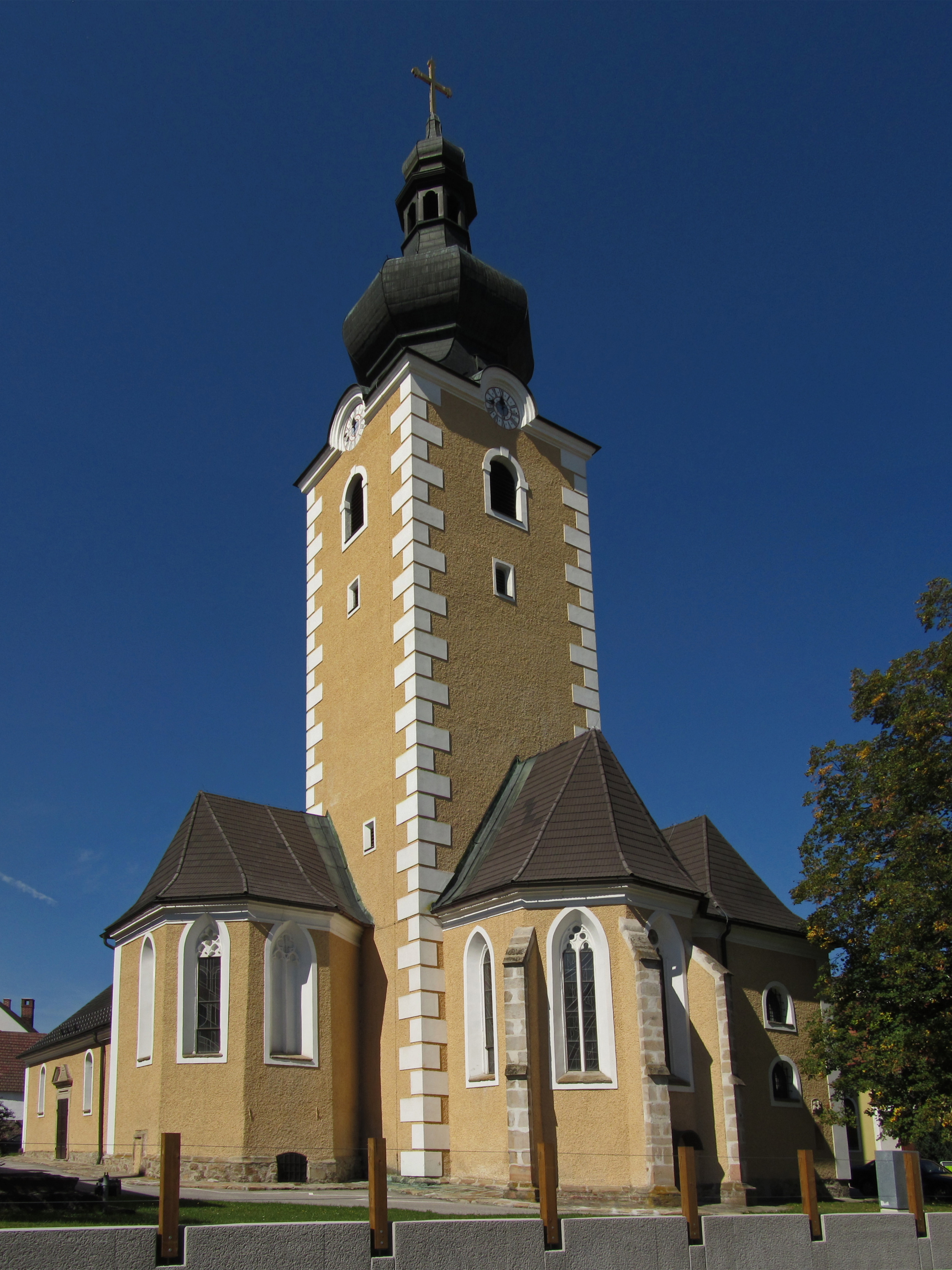 Romanische Chorturmkirche, erbaut im 12./13. Jahrhundert, später mehrmals erweitert und zu einer dreischiffigen Staffelkirche umgestaltet.